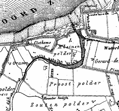 Proostpolder